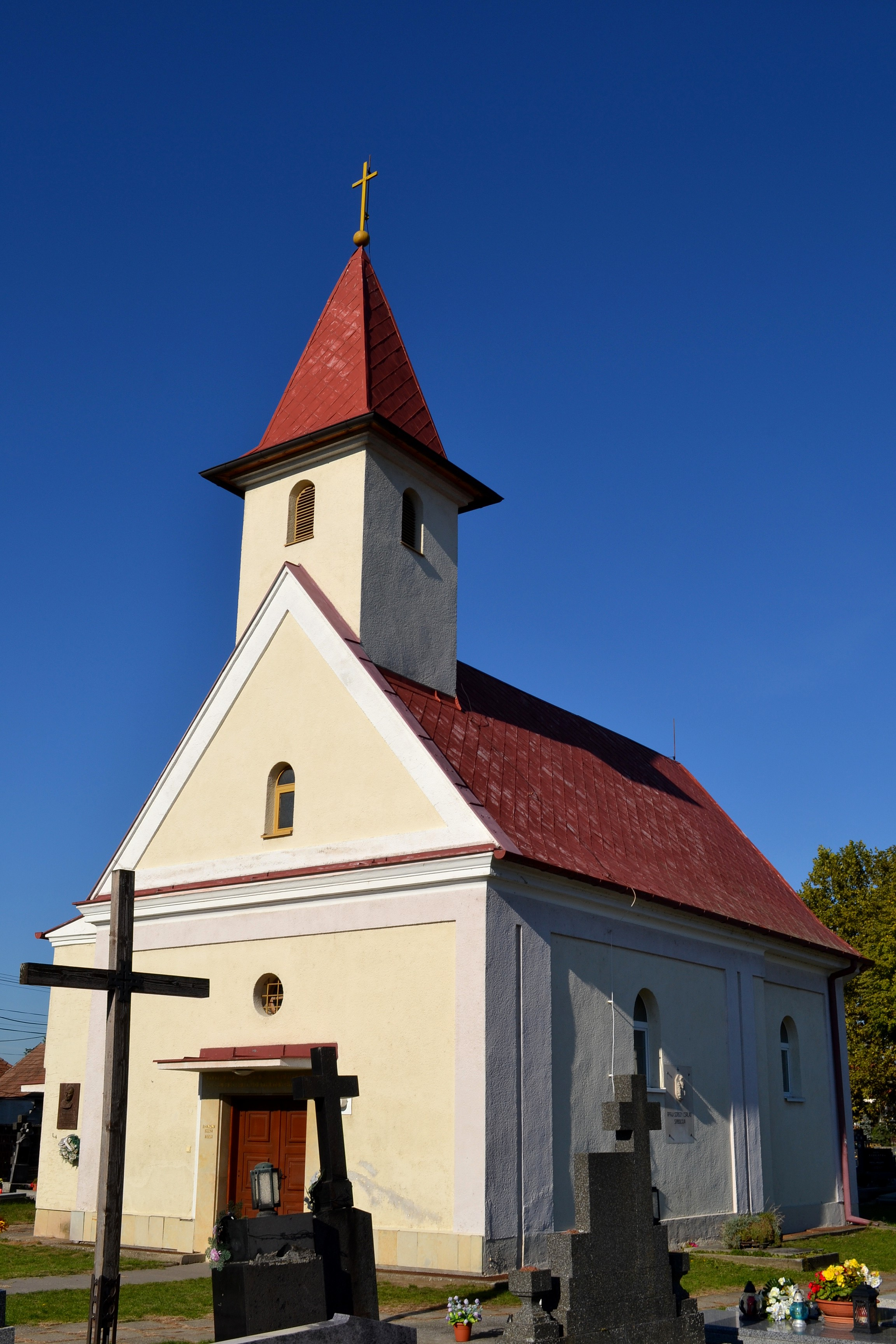 Opoj (okr. Trnava), Kostol Najsvätejšej Trojice